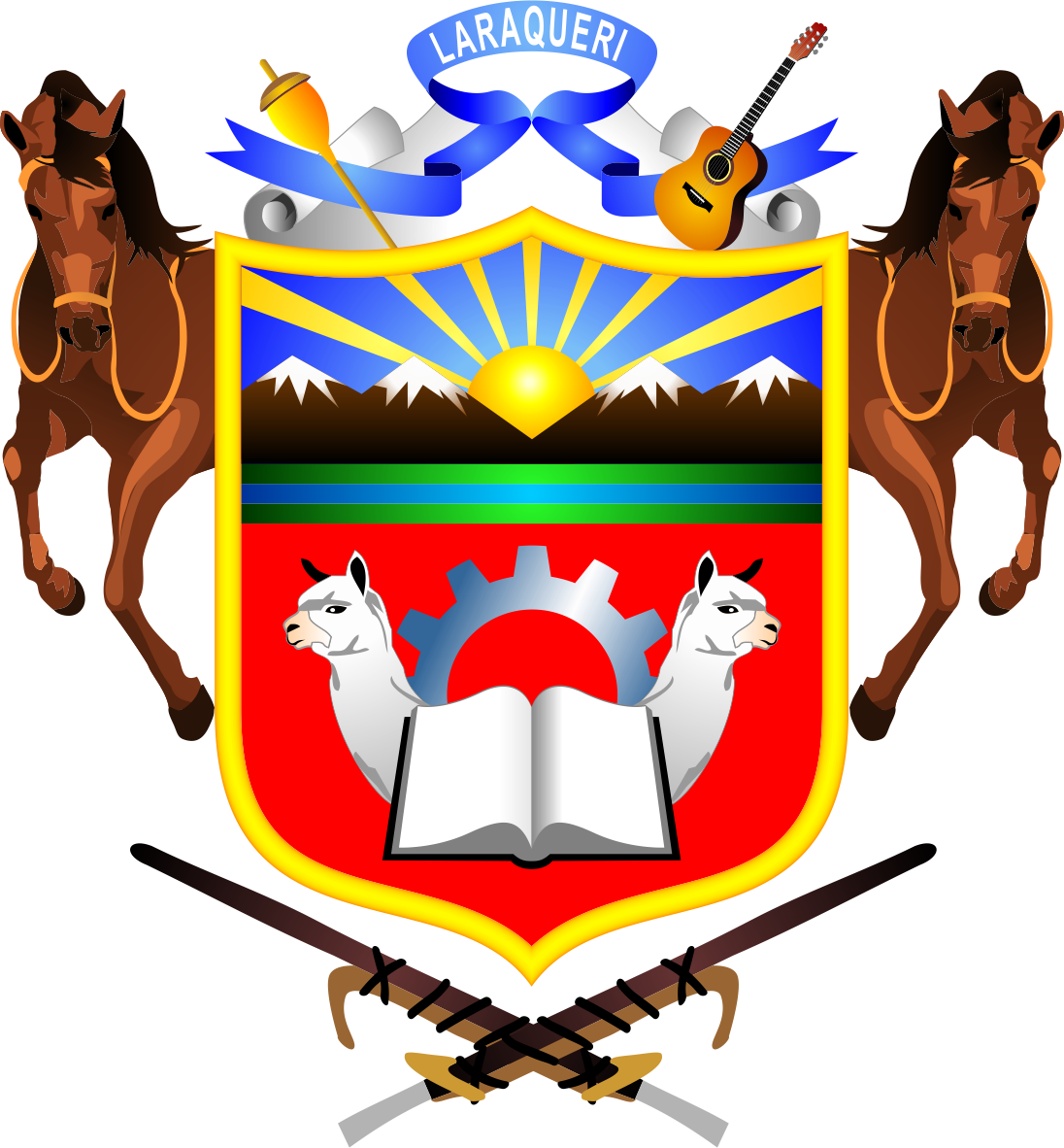 Distrito de Pichacani - Provincia de Puno - Región Puno